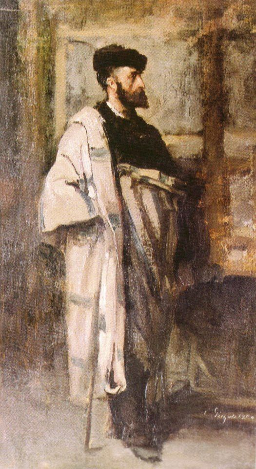 Evreu galitian